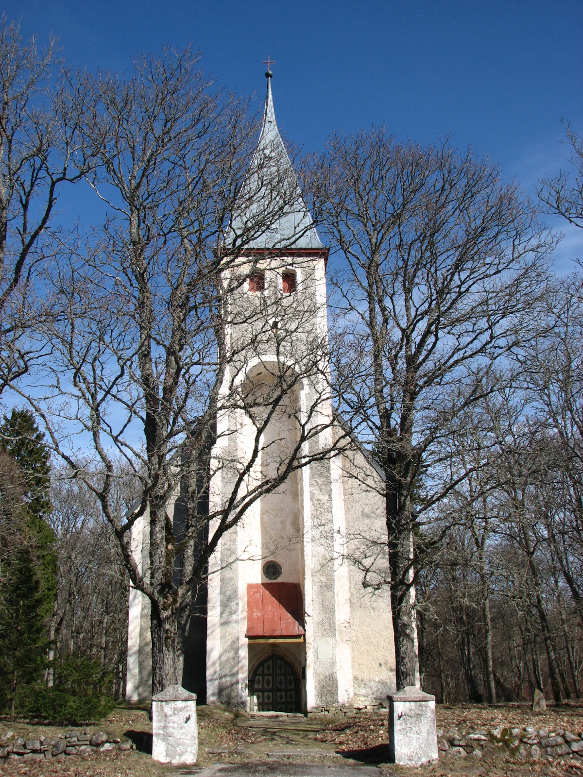 Karuse kirik Kinksi külas Hanila vallas